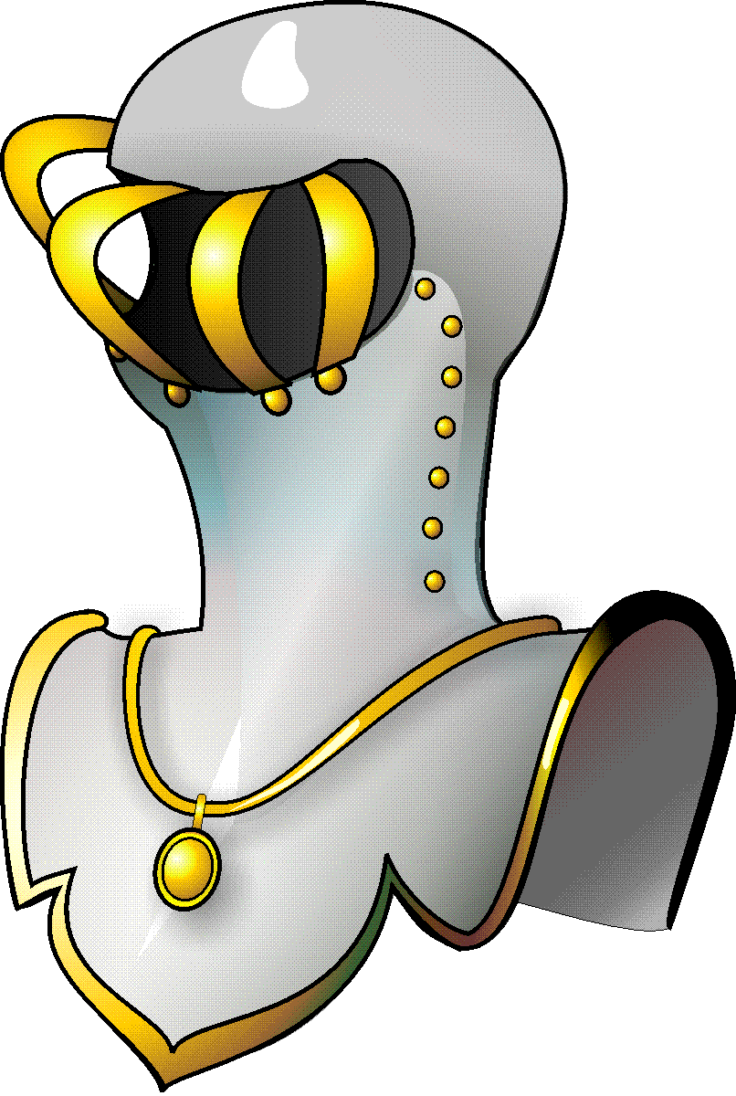 Banneret Helmet